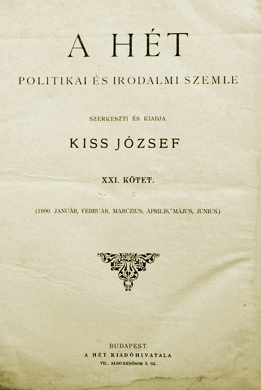 A Hét című folyóirat címlapja, 1900